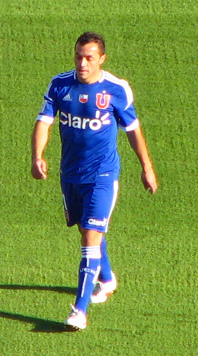 Marcelo Diaz con la camiseta de la U de Chile en el partido que enfrentó a su club con el Coco Colo el 29 de abril de 2012 en el Estadio Nacional de Chile.